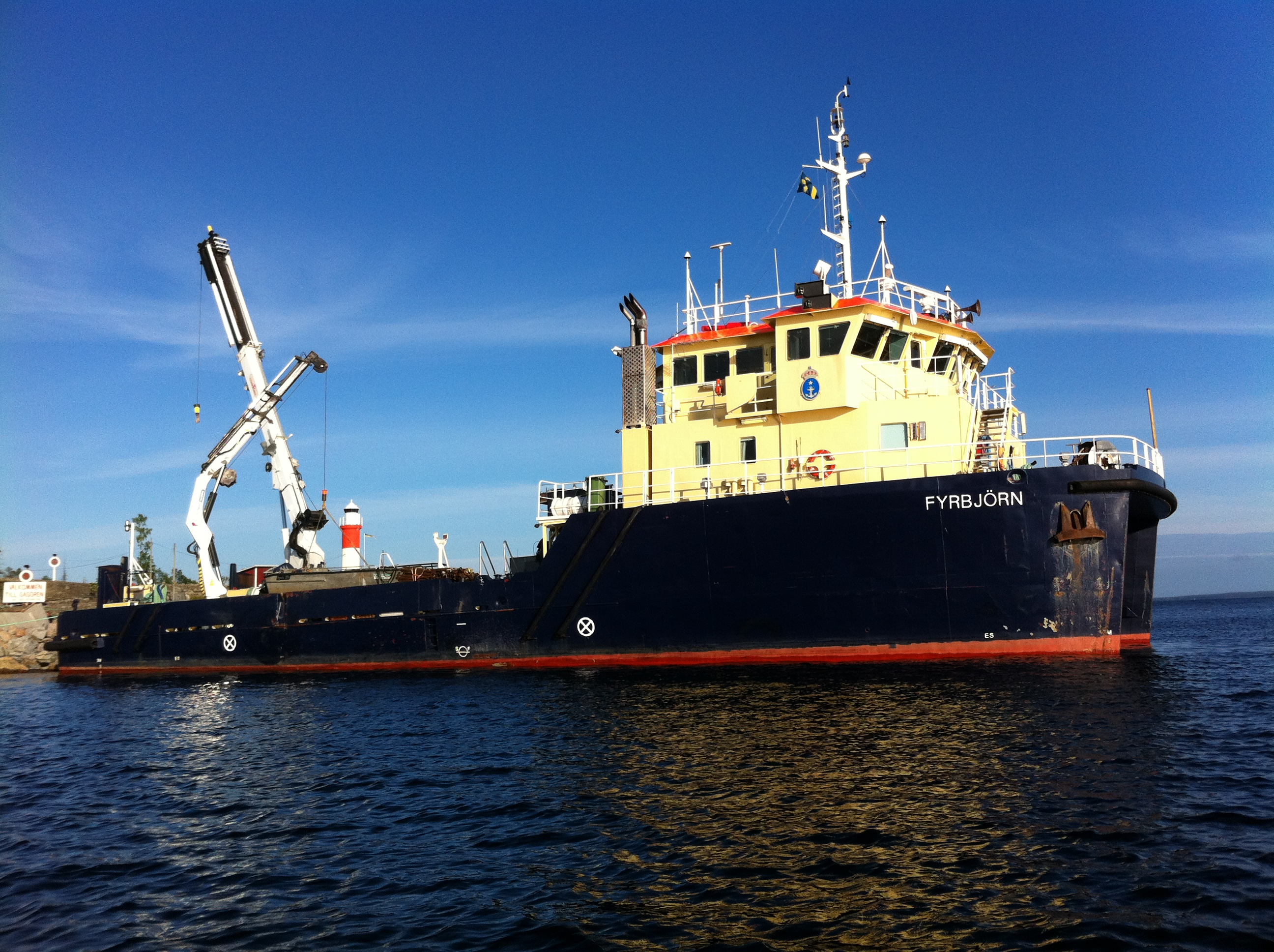 MS Fyrbjörn på Gåsören juni 2012